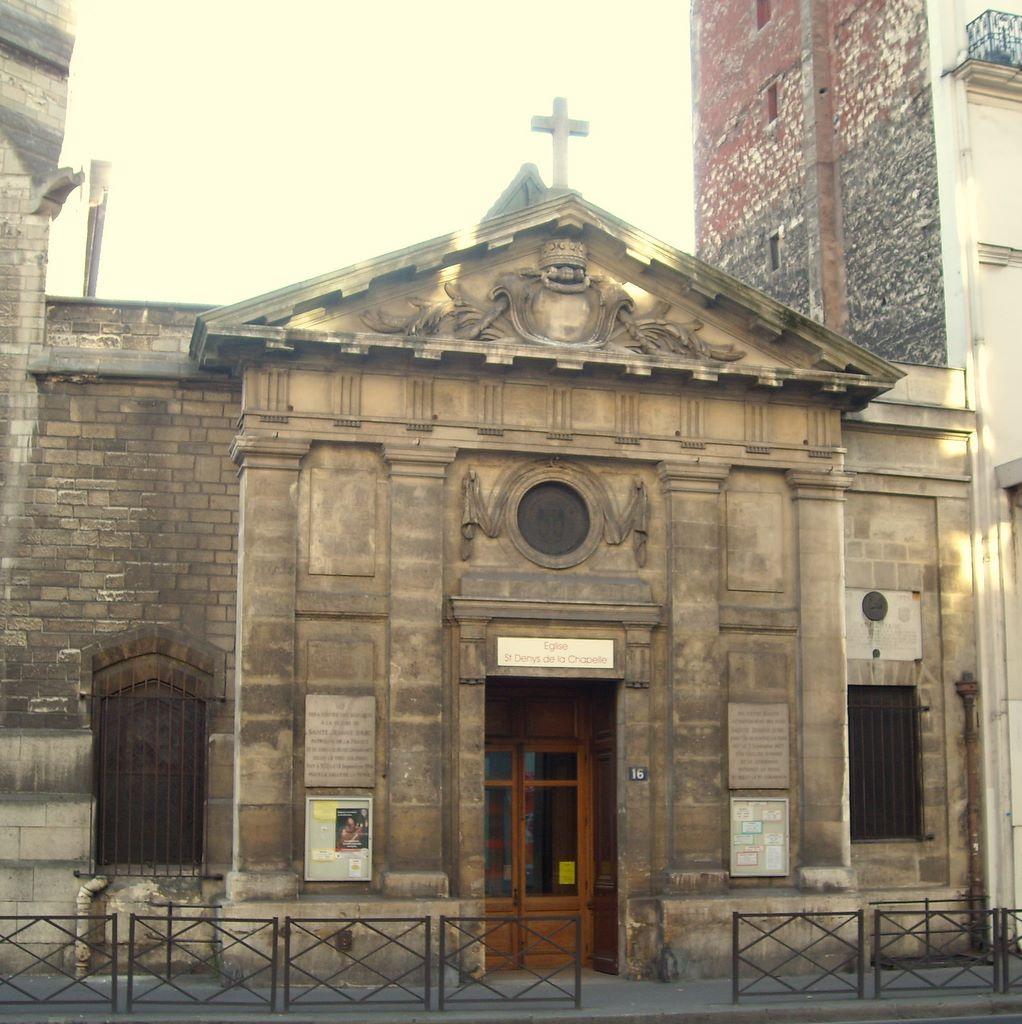 Entrée de l'église Saint-Denys de la Chapelle